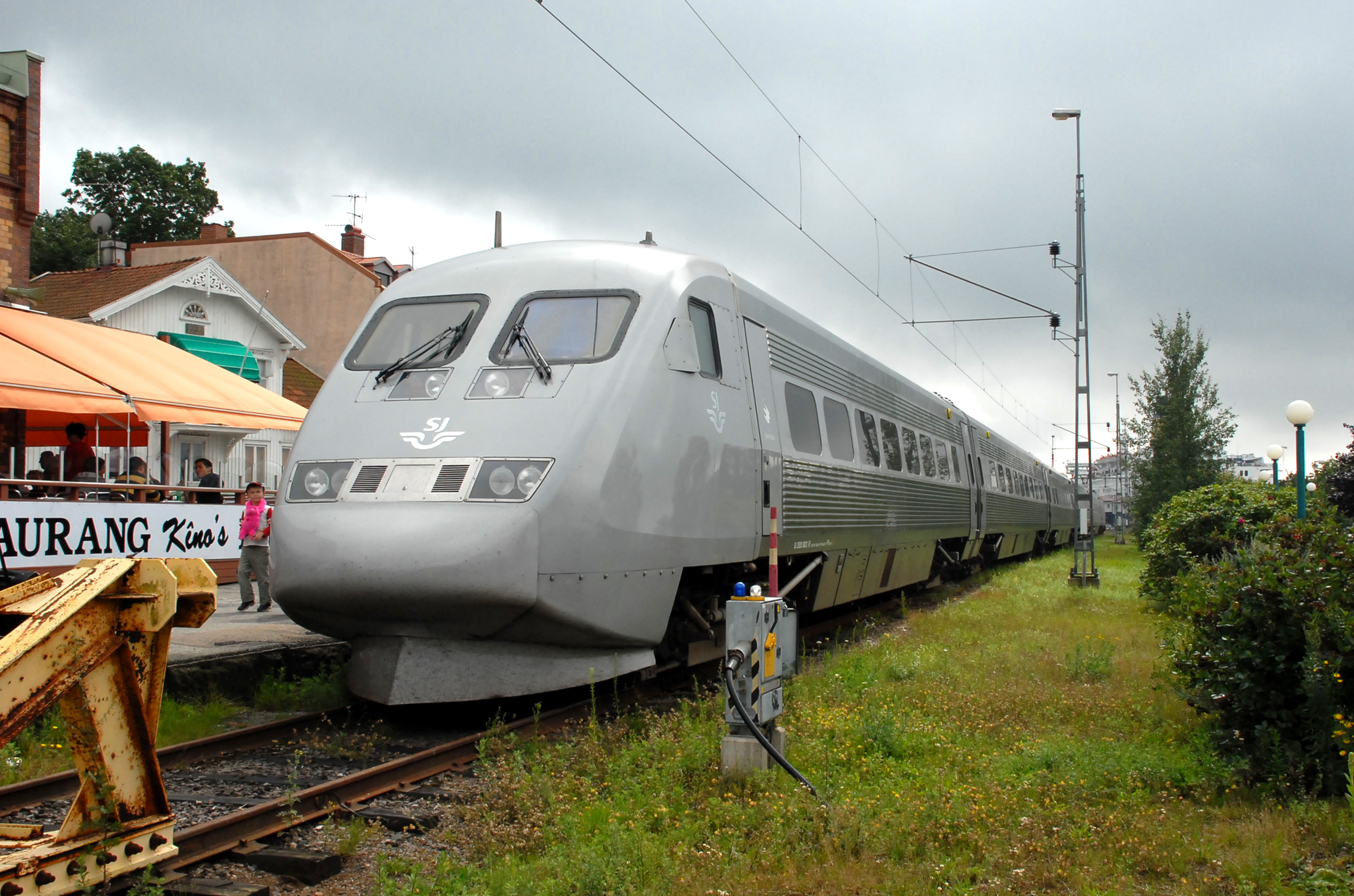 Statens Järnvägar (SJ) treinstel van de serie X2 (X2000) op 26 juli 2007 te Strömstad